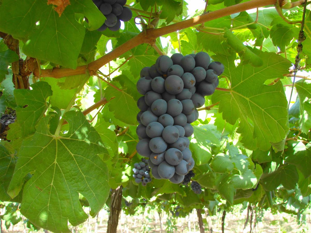 Vale do São Francisco Pernanbuco agricultura